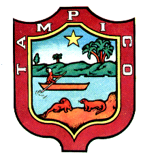 Escudo de armas de Tampico, Tamaulipas